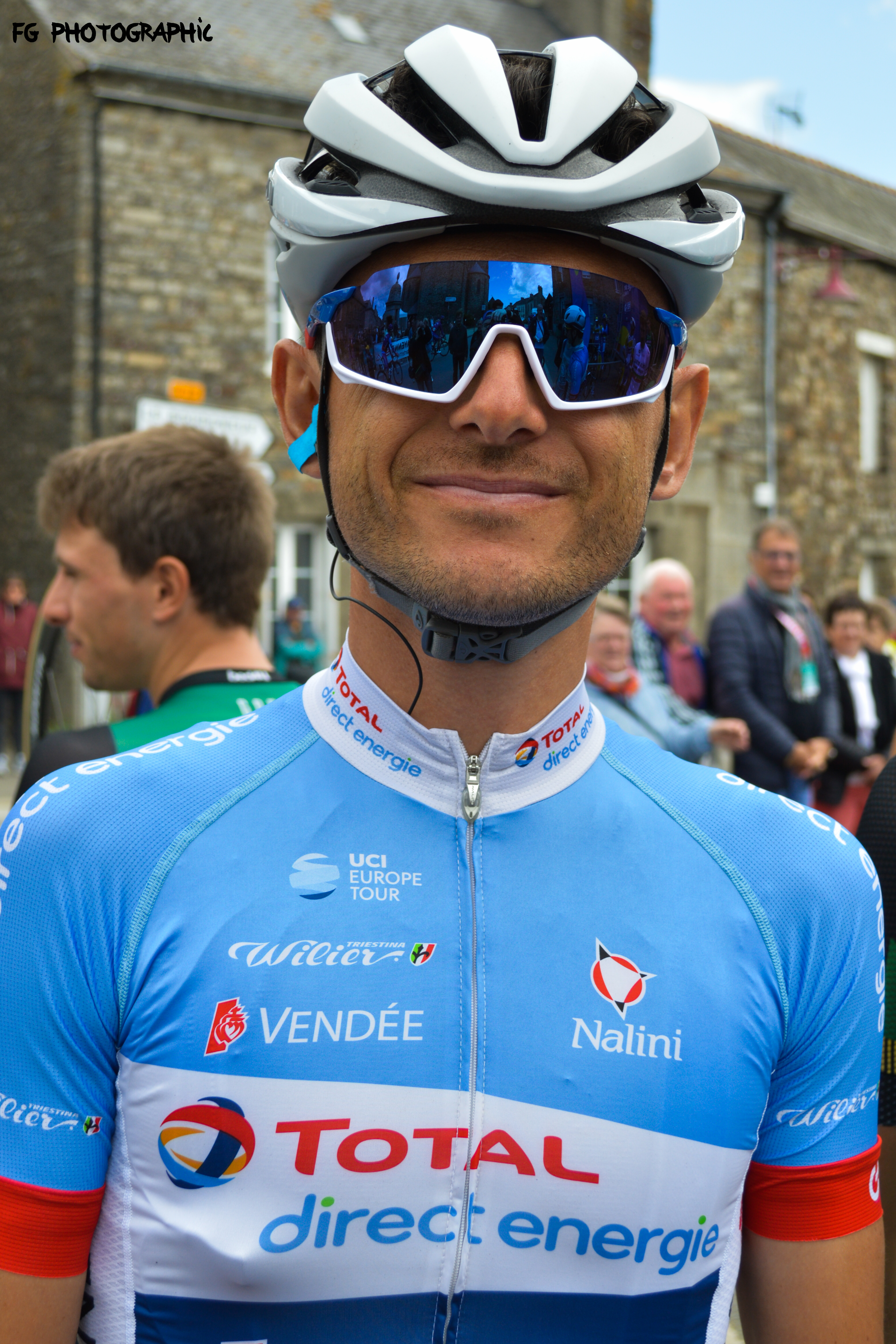 Portrait